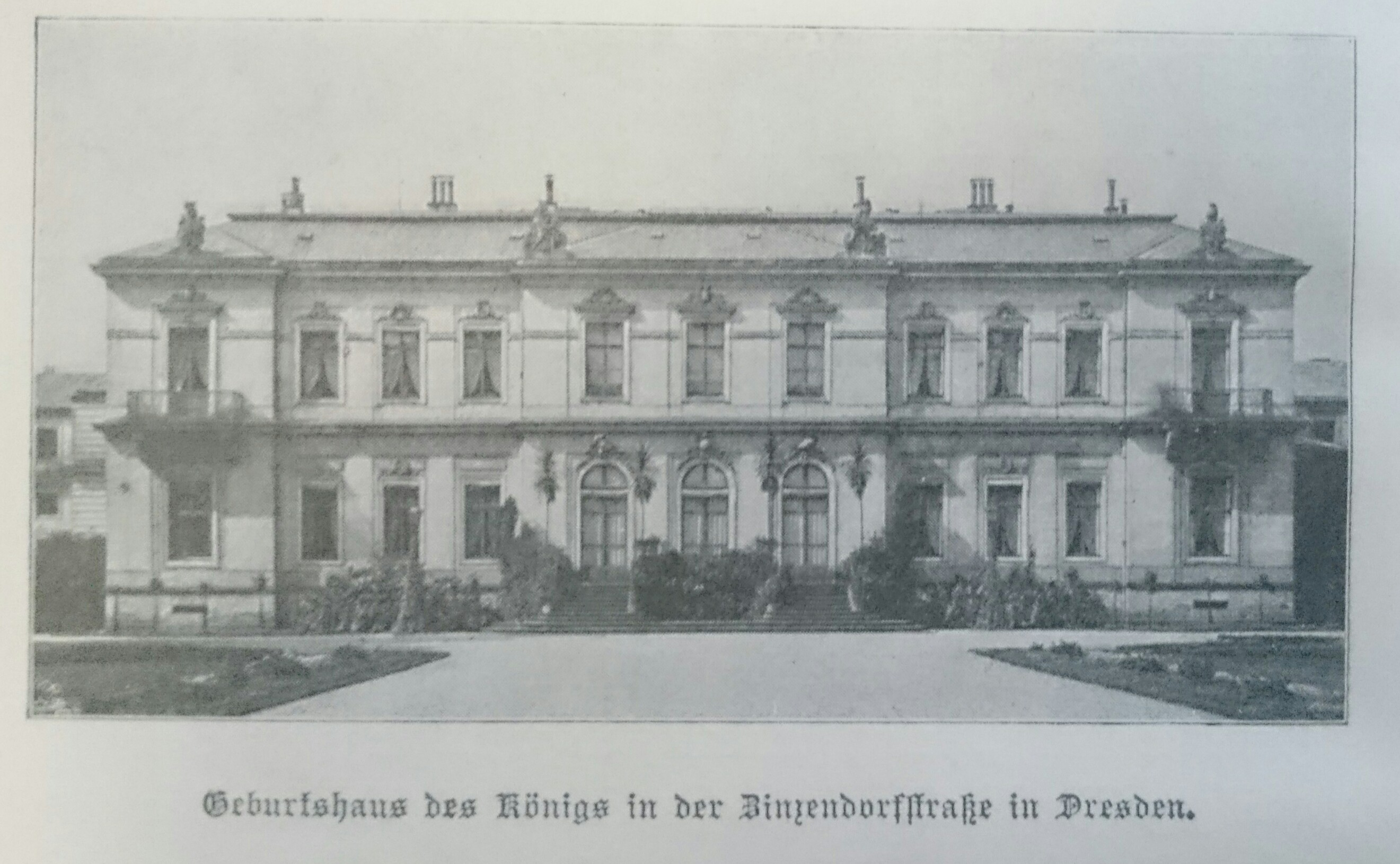 Pailais Zinsendorfstraße Dresden